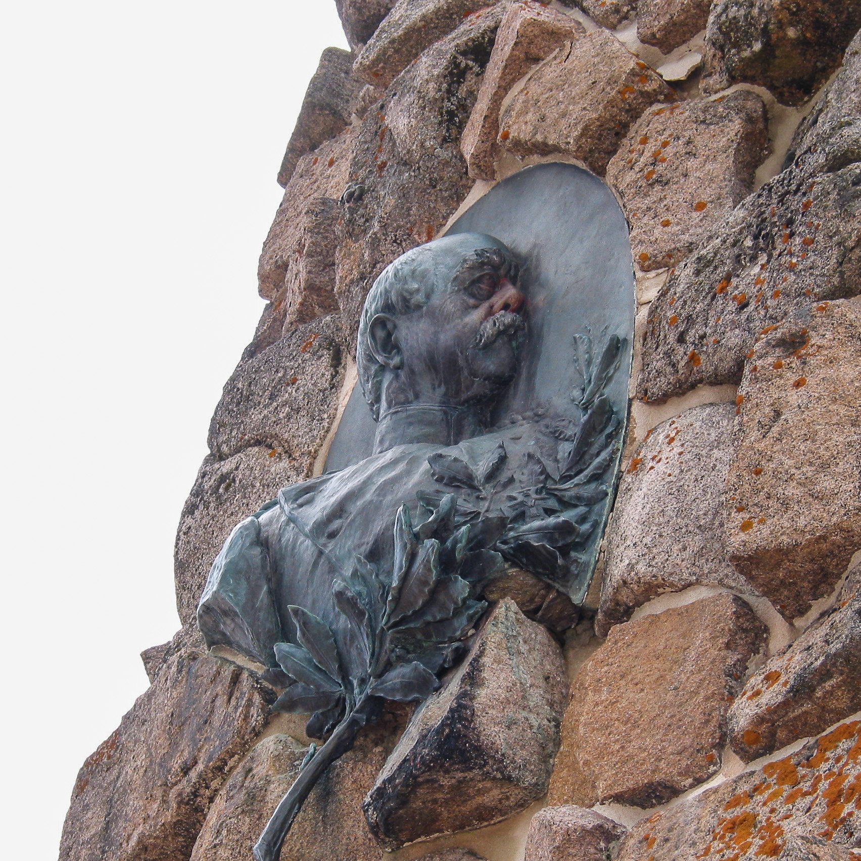 Fridolin Dietsche: Bildnismedaillon am Bismarckdenkmal, Seebuck/Feldberg, Schwarzwald